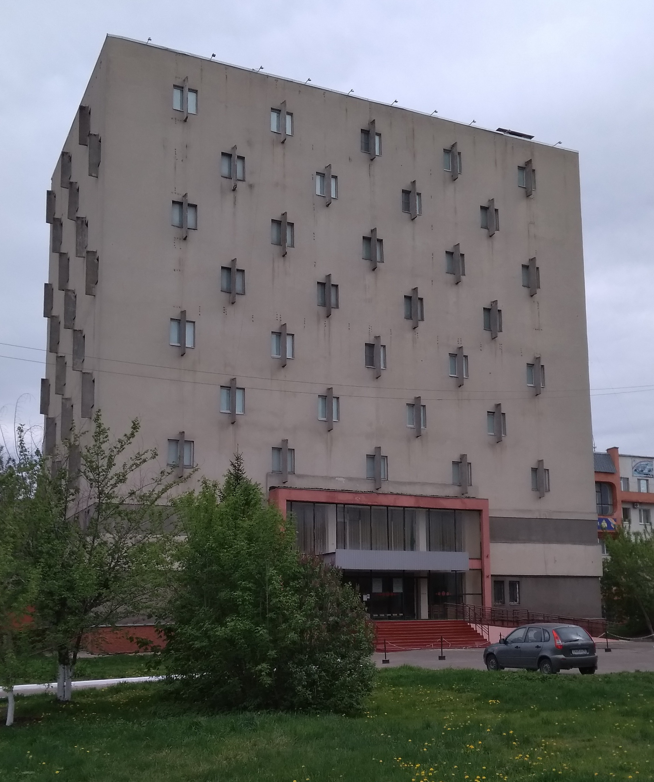 Здание Государственного архива Пензенской области (г. Пенза, ул. Дзержинского, 7)